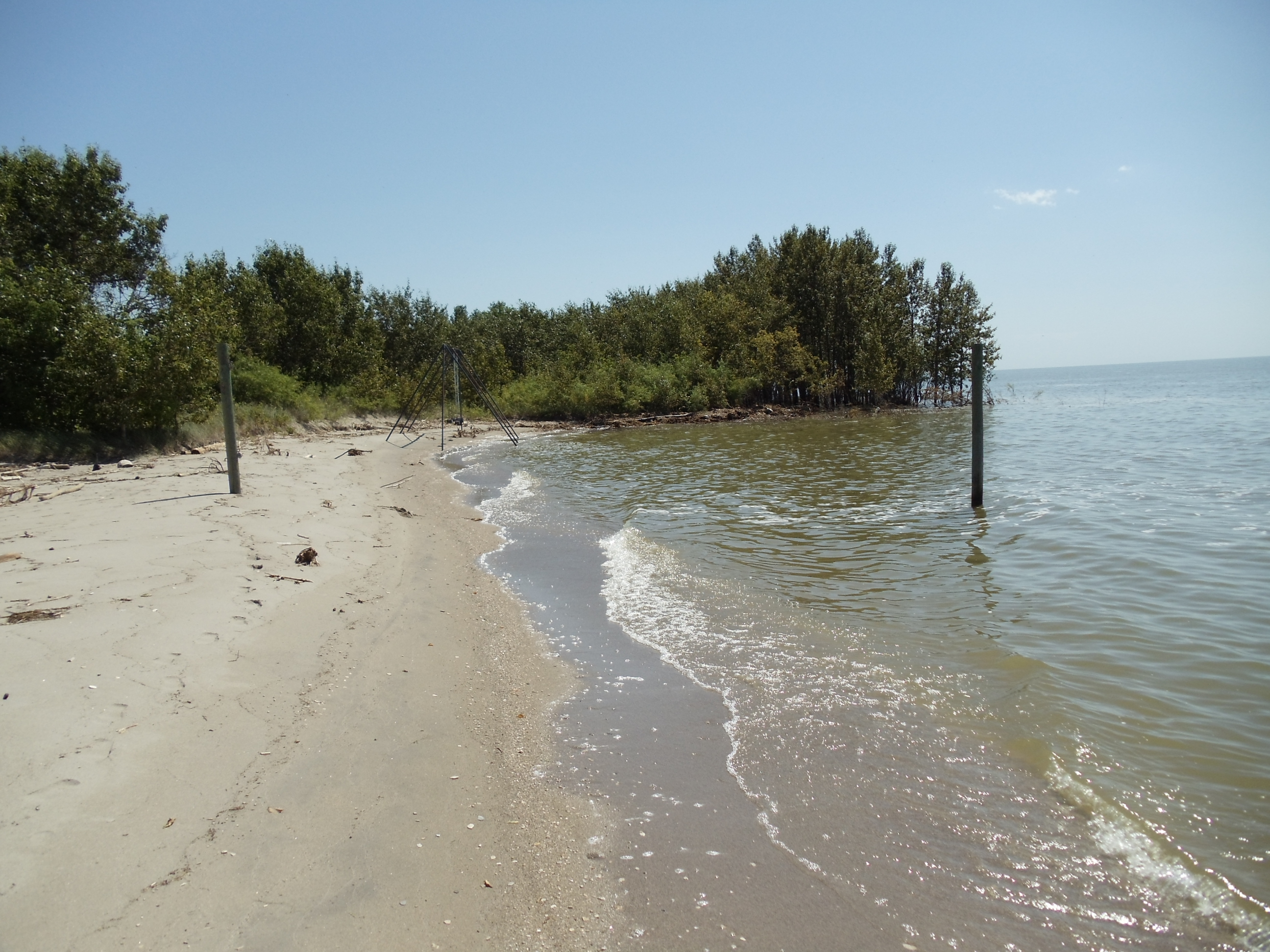 Lundar Beach